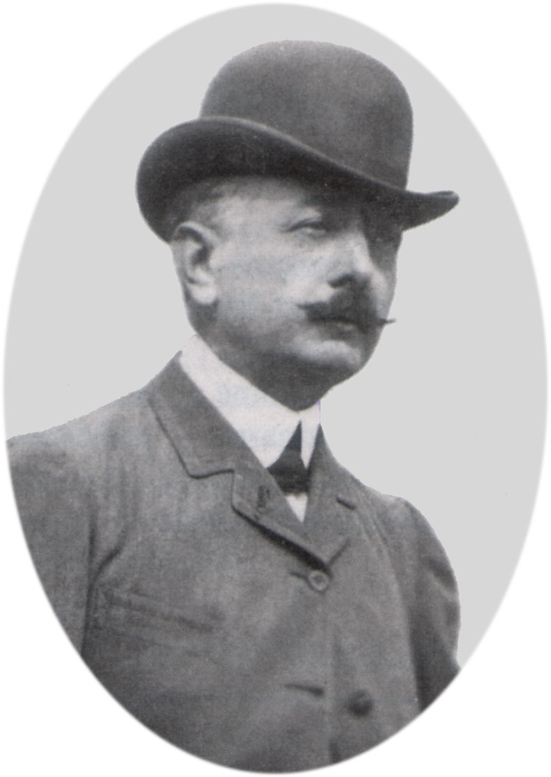 Edmond Blanc vers 1900